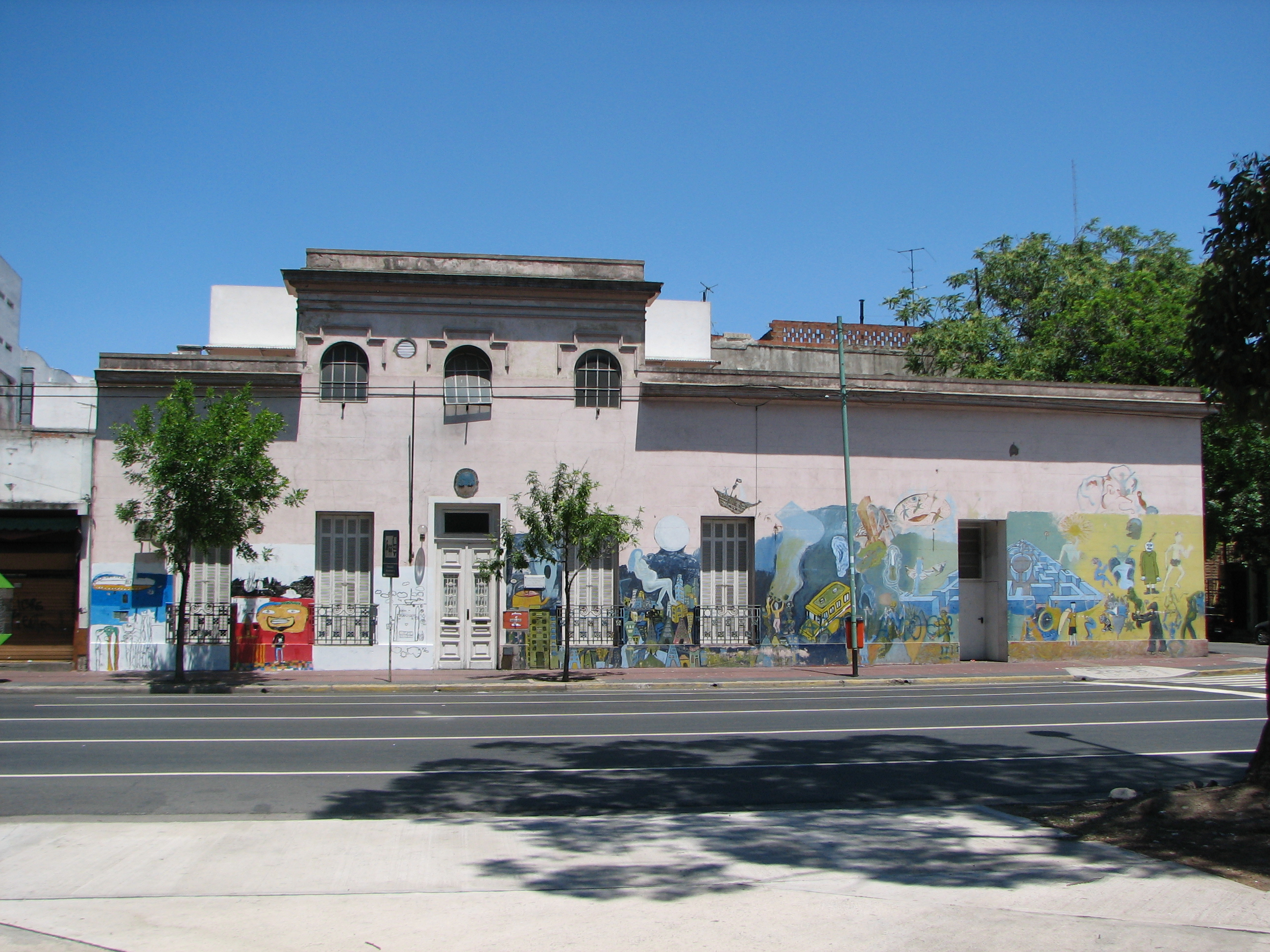 Imagen del edificio de la sede principal del Instituto Vocacional de Arte Manuel J. de Labardén en las esquinas de Garay y Solís de la Ciudad de Buenos Aires.